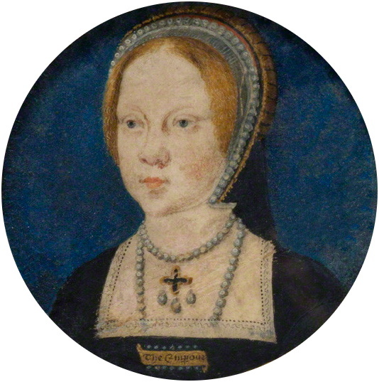 Portrait miniature